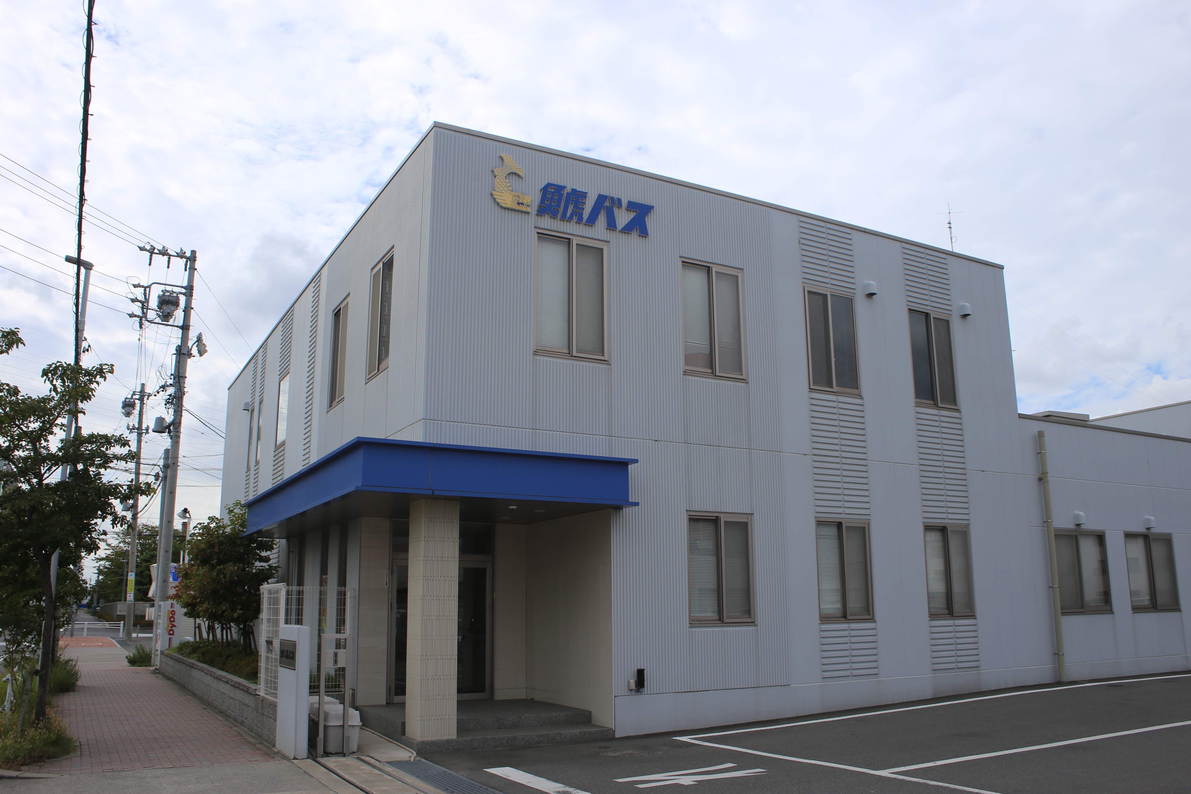 名古屋市南区滝春町 鯱バス本社